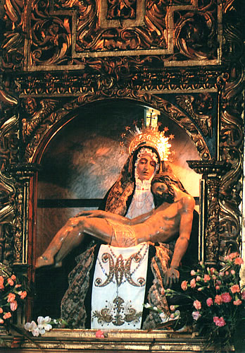 Piedad, en la Ermita de Nuestra Señora de la Soledad de Soria (Castilla y León, España)